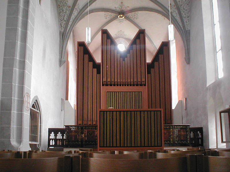 Orgel in der Stadtkirche in Murrhardt